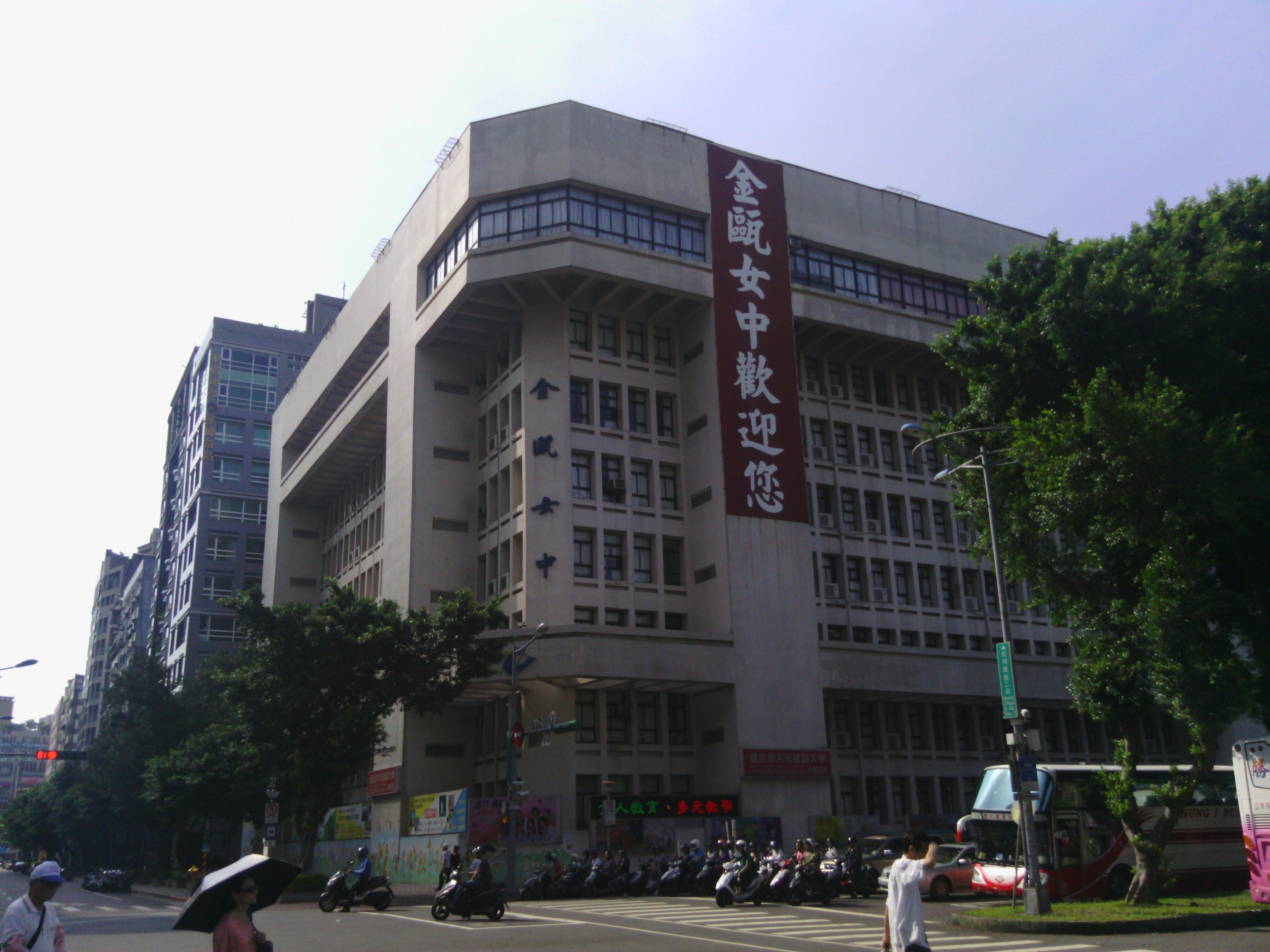 臺北市私立金甌女子高級中學，位於臺灣臺北市大安區杭州南路二段1號。